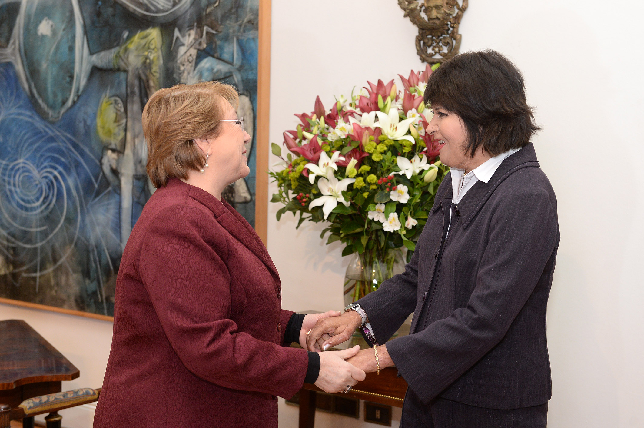 Gobierno de Chile